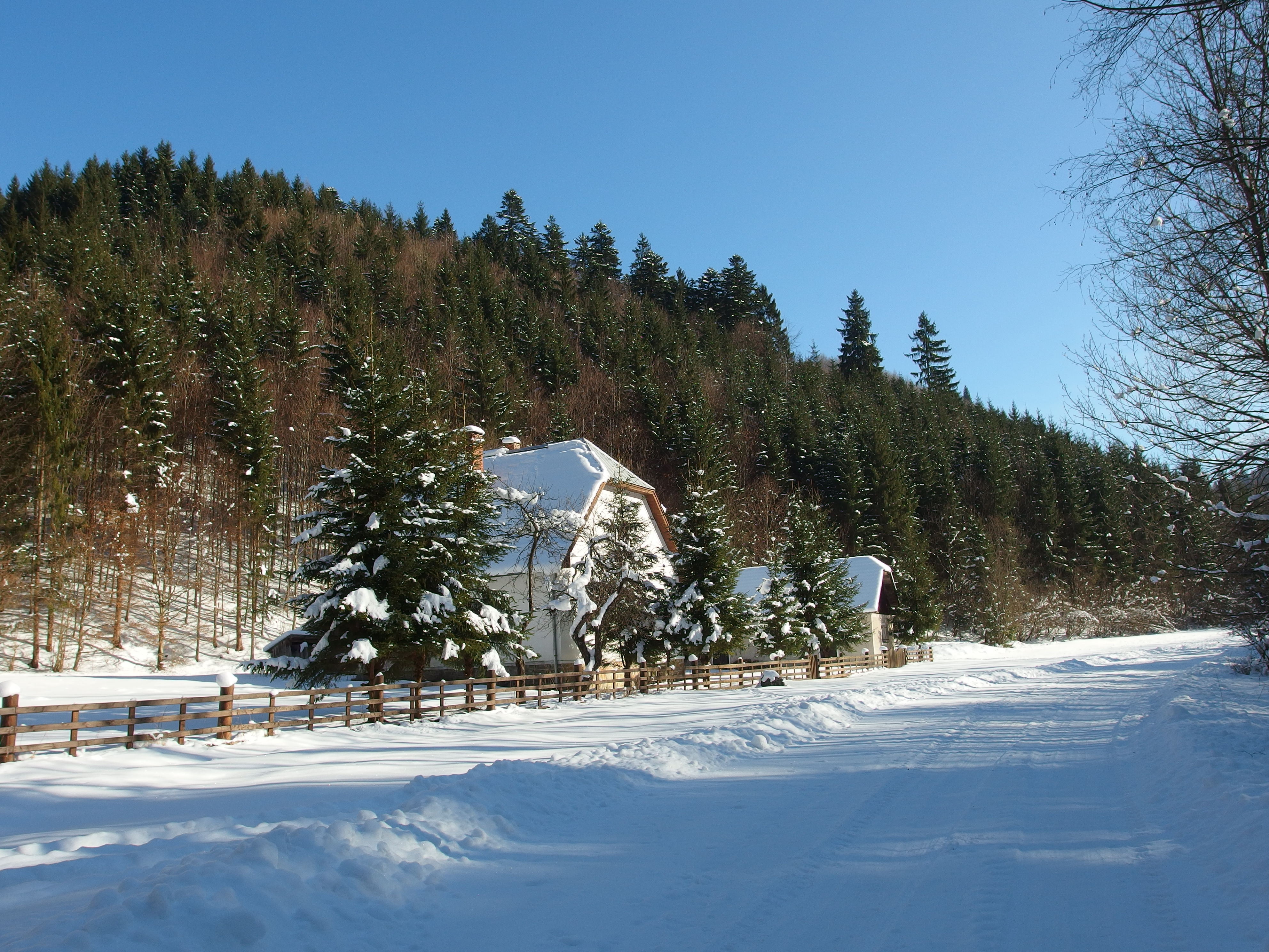 Opustená horáreň Smrekov